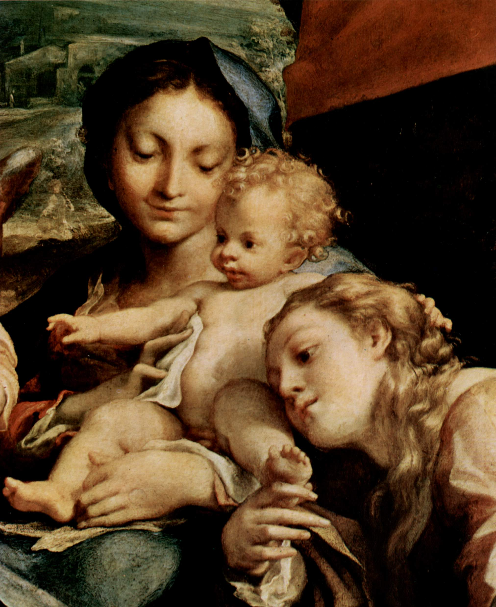 detail: Christuskind und Maria Magdalena